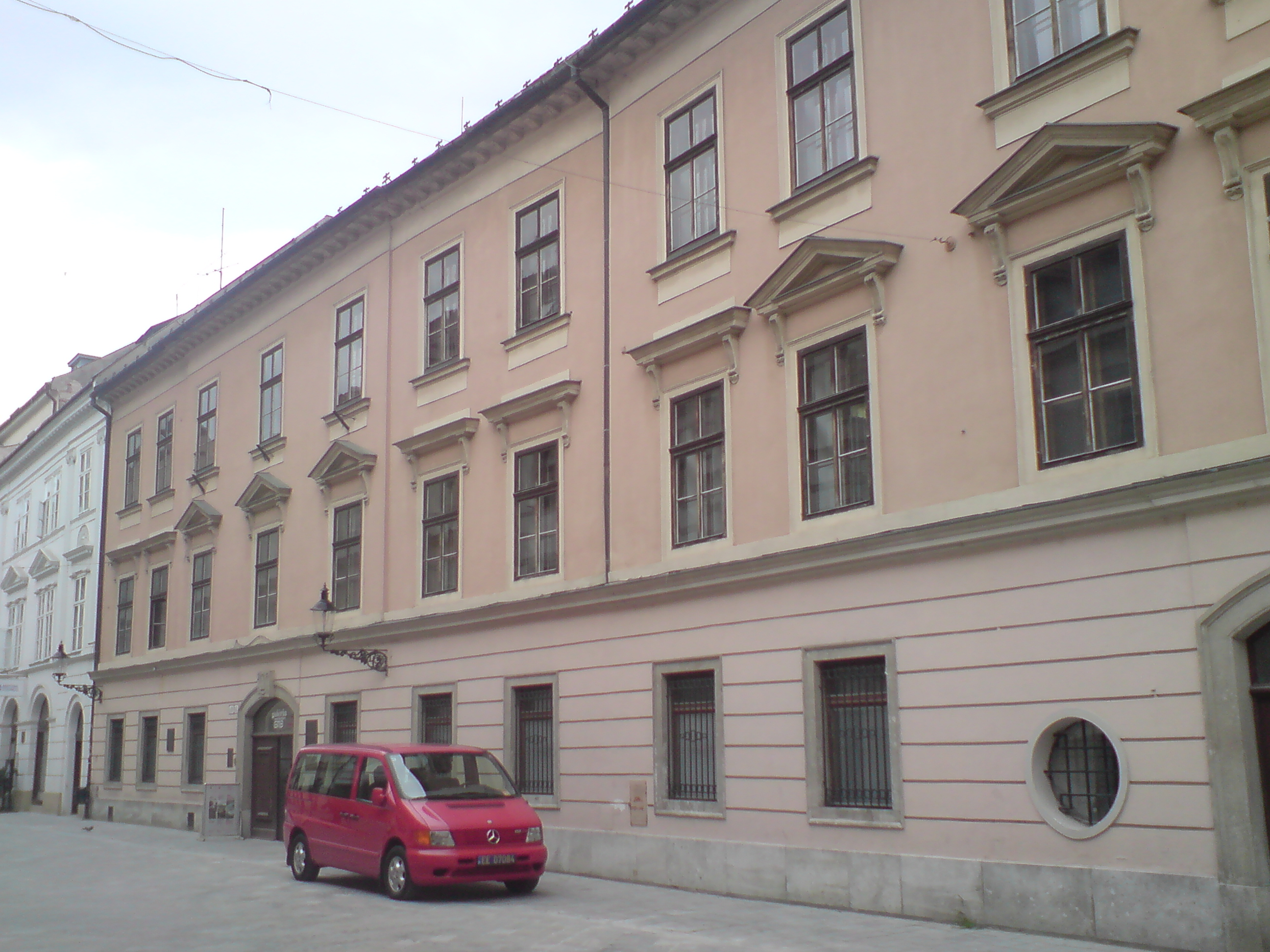 Pálffyho palác, Panská, Bratislava